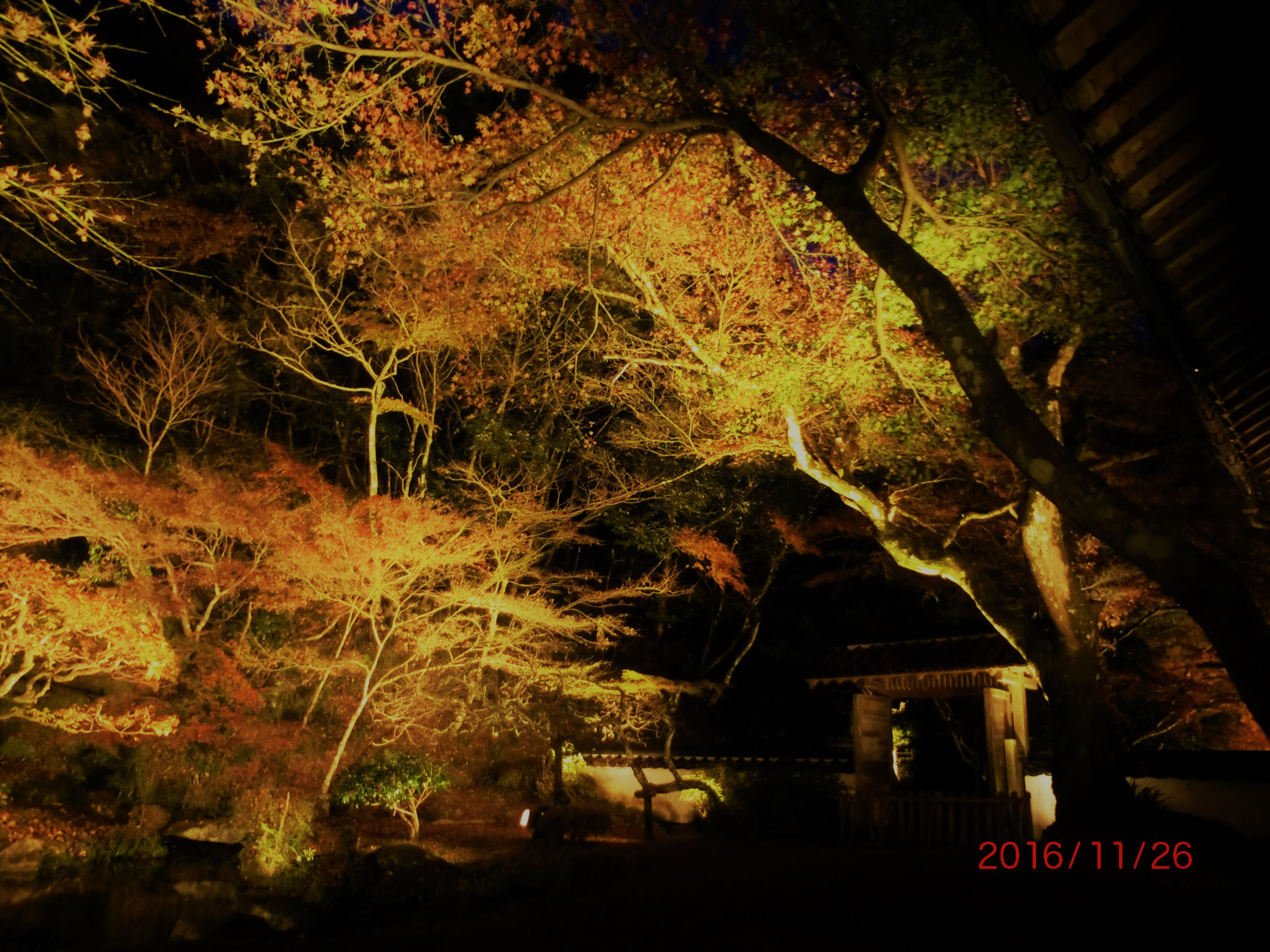 2016年11月26日、ライトアップされた魚楽園。